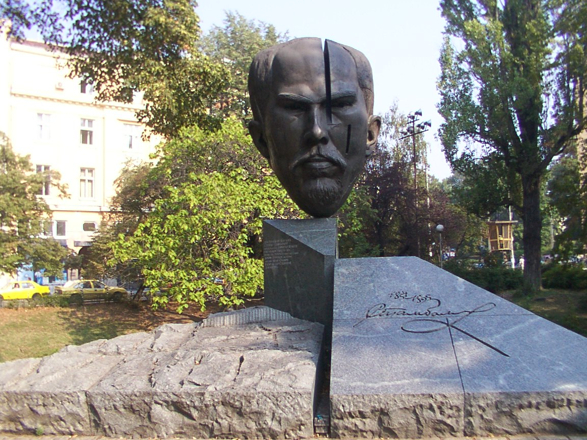 Паметник Стефан Стамболов София